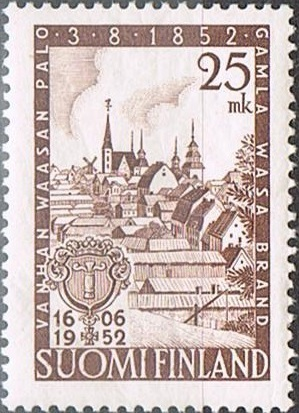 Frimärke till 100-årsminnet av Vasa brand. This postage stamp published by Posti- ja telelaitos before January 1, 1990 is in the public domain in Finland because it is a part of a decision issued by a public authority in Finland. Section 9 of the Finnish Copyright Act specifies that no copyright exists in such material. (Link to the Act) This template does not apply to postage stamps first published after 1989. Because Posti- ja telelaitos was changed from an authority to a company in the beginning of 1990, postage stamps published by Posti- ja telelaitos were not anymore part of decisions by an authority. Most probably the copyright owner of postage stamps published after 1989 are Itella Oyj or the designer of them. All postage stamps first published after 1989 marked with this tag should be speedily deleted.